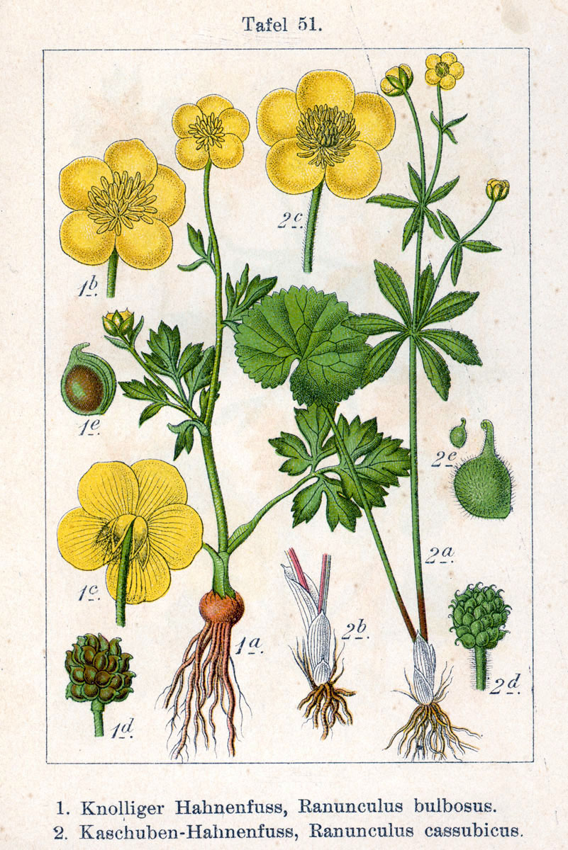 1. Ranunculus bulbosus L. 2. Ranunculus cassubicus L. Original Description 1. Knolliger Hahnenfuss, Ranunculus bulbosus 2. Kaschuben-Hahnenfuss, Ranunculus cassubicus